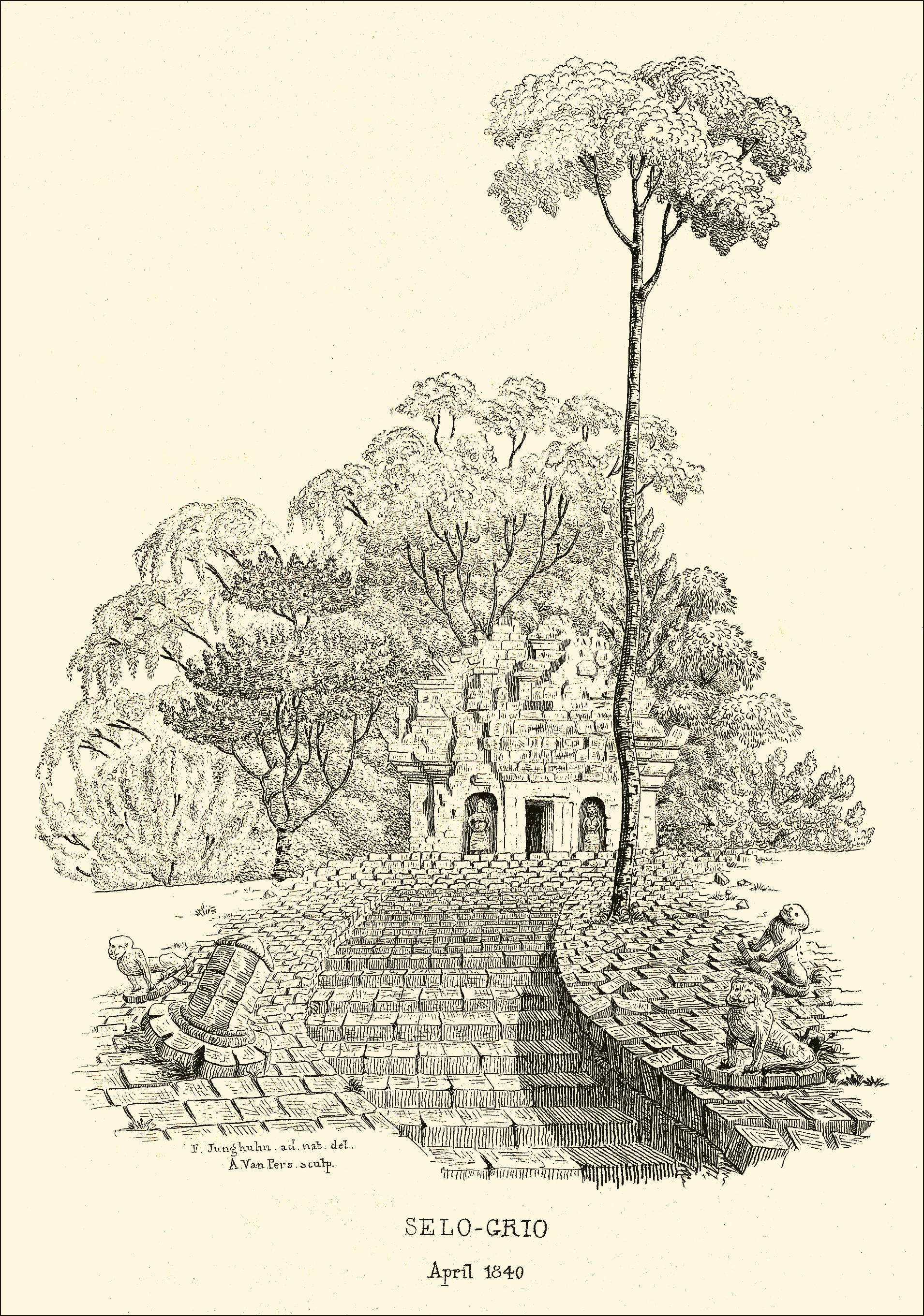 Candi Selo Grio